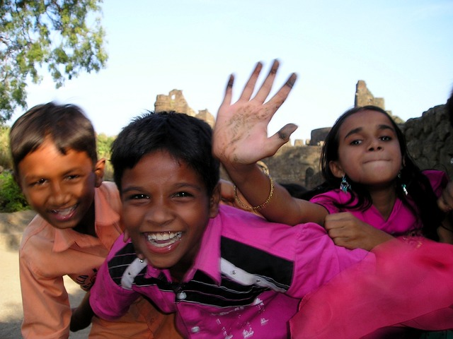 Niños y niñas de la India jugando